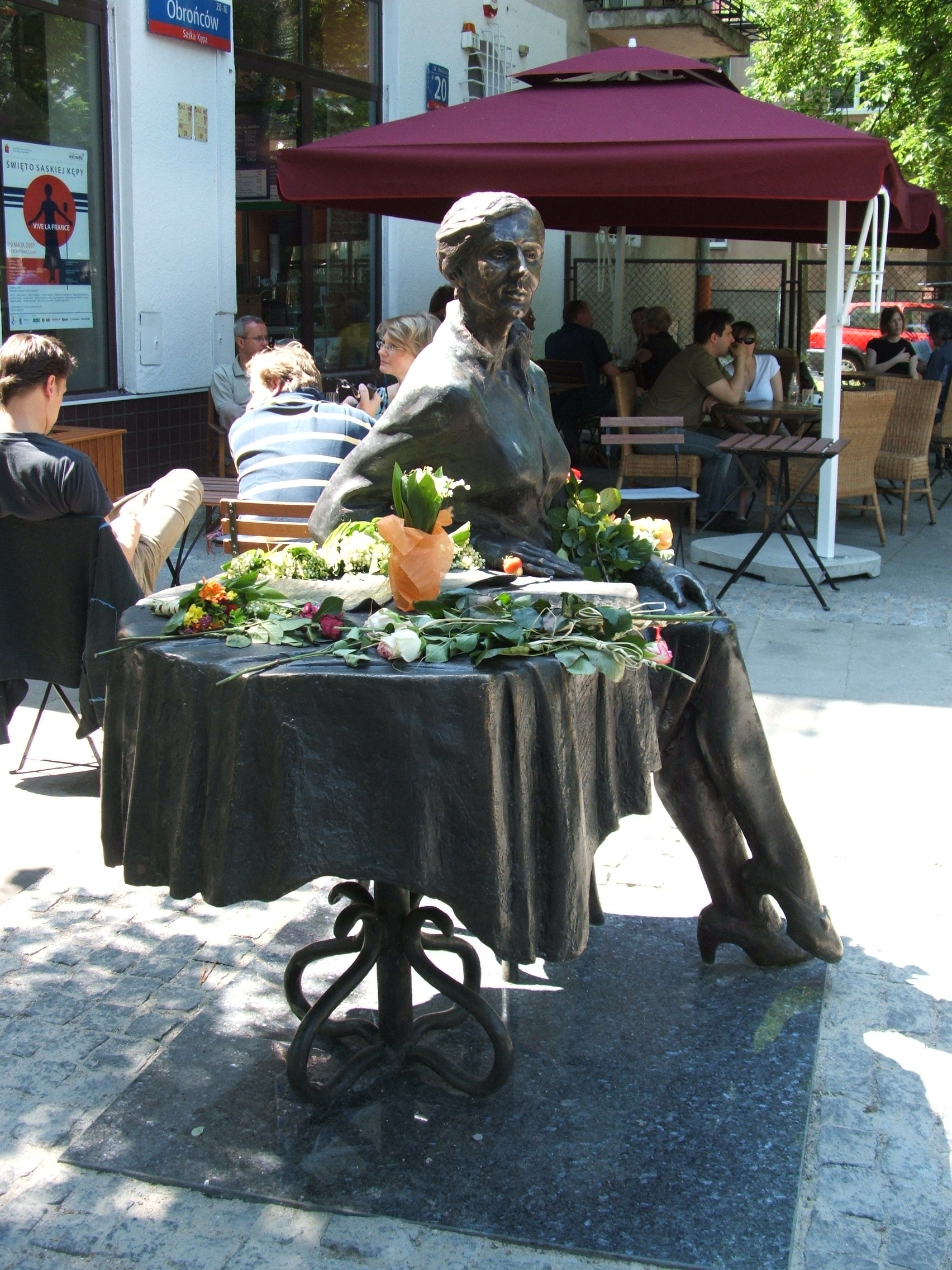 Pomnik Agnieszki Osieckiej, ul. Francuska, Warszawa